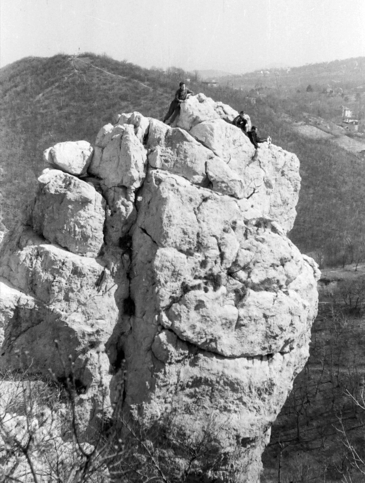 Tündér-hegy, Tündér-szikla. Location: Hungary, Budapest XII. Tags: Budapest Title: Tündér-hegy, Tündér-szikla.